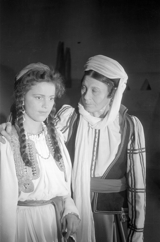 Original image description from the Deutsche FotothekPaul Wegener in der Titelrolle, Agathe Poschmann als Recha, Kai Möller als Sultan Saladin und Eduard von Winterstein als Klosterbruder